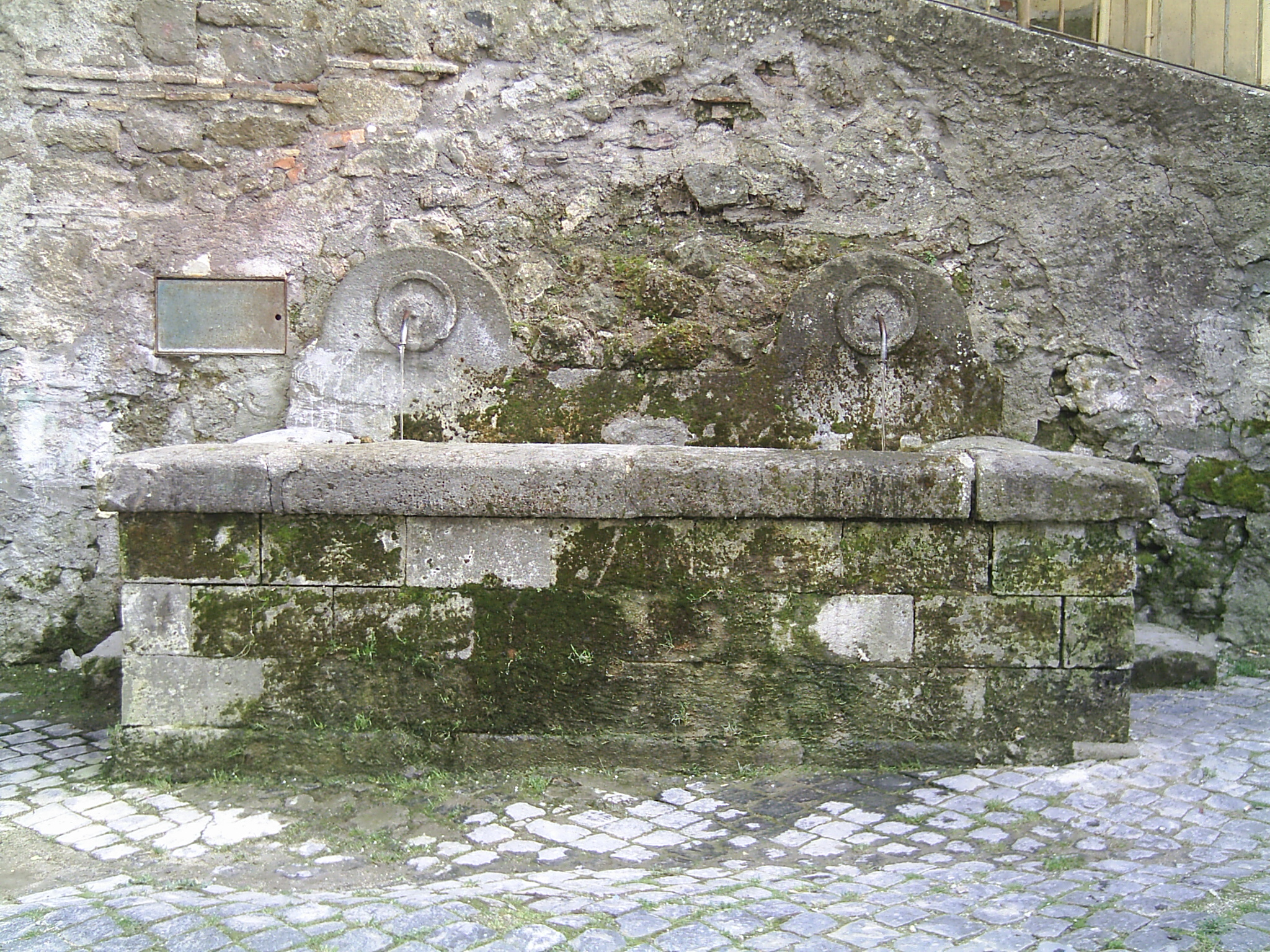 Piazza Vecchia, Rocca di Papa